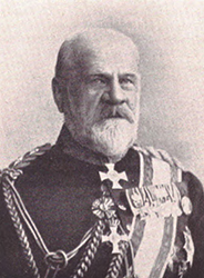 General der Infanterie Albert von Rauch